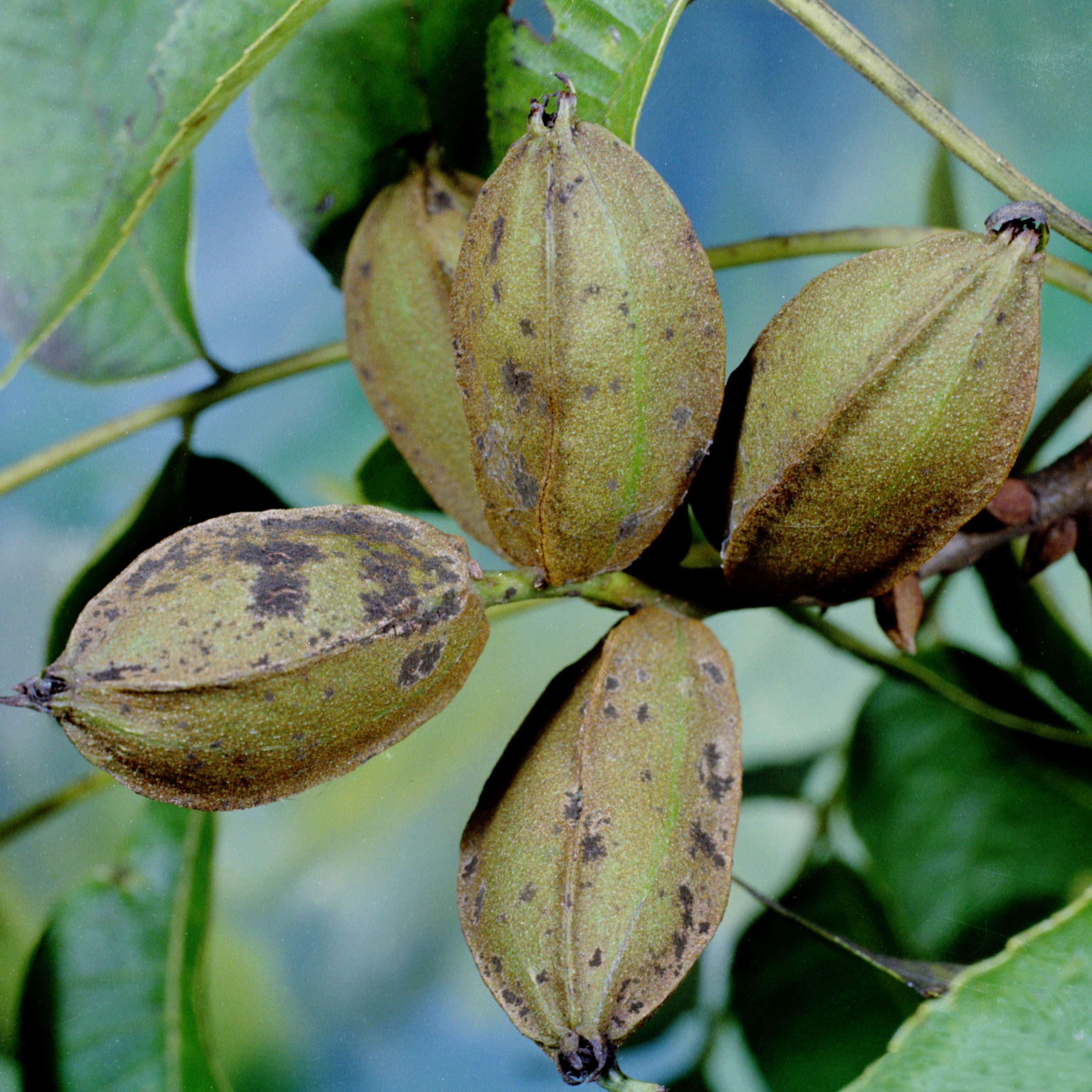 Cladosporium caryigenum causing pecan scab